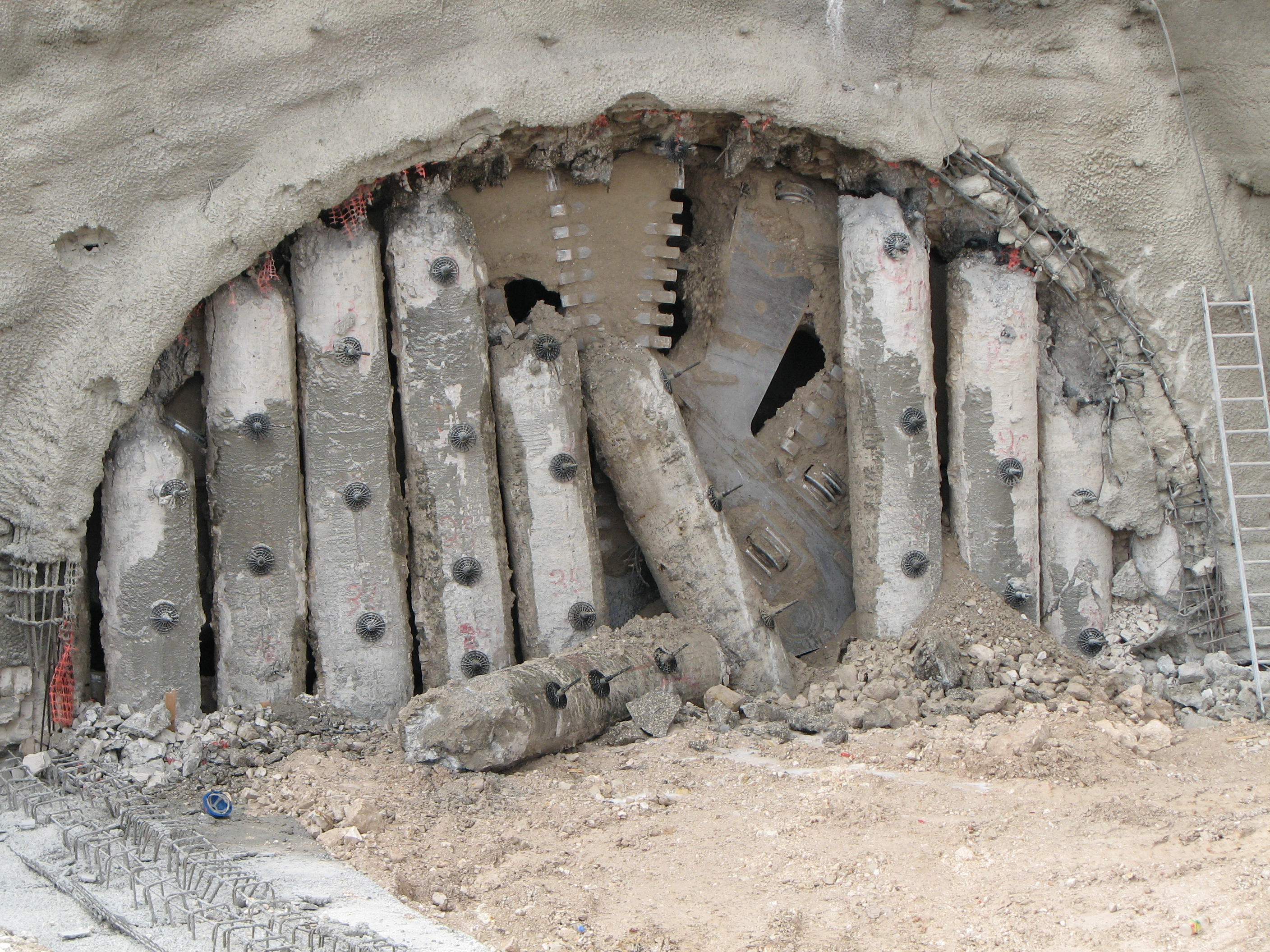 מכונת TBM פורצת החוצה ממנהרה מספר 1 בקו הרכבת המהיר לירושלים